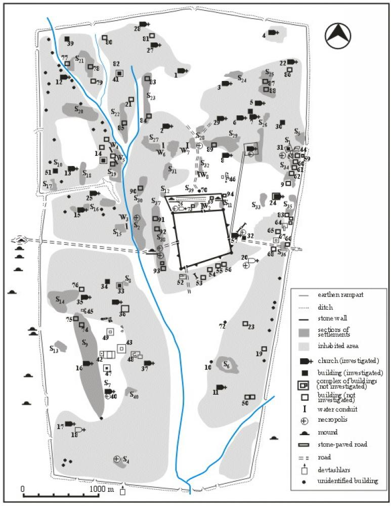 Carte du site Aboba-Pliska montrant les principaux bâtiments ainsi que les fortifications.